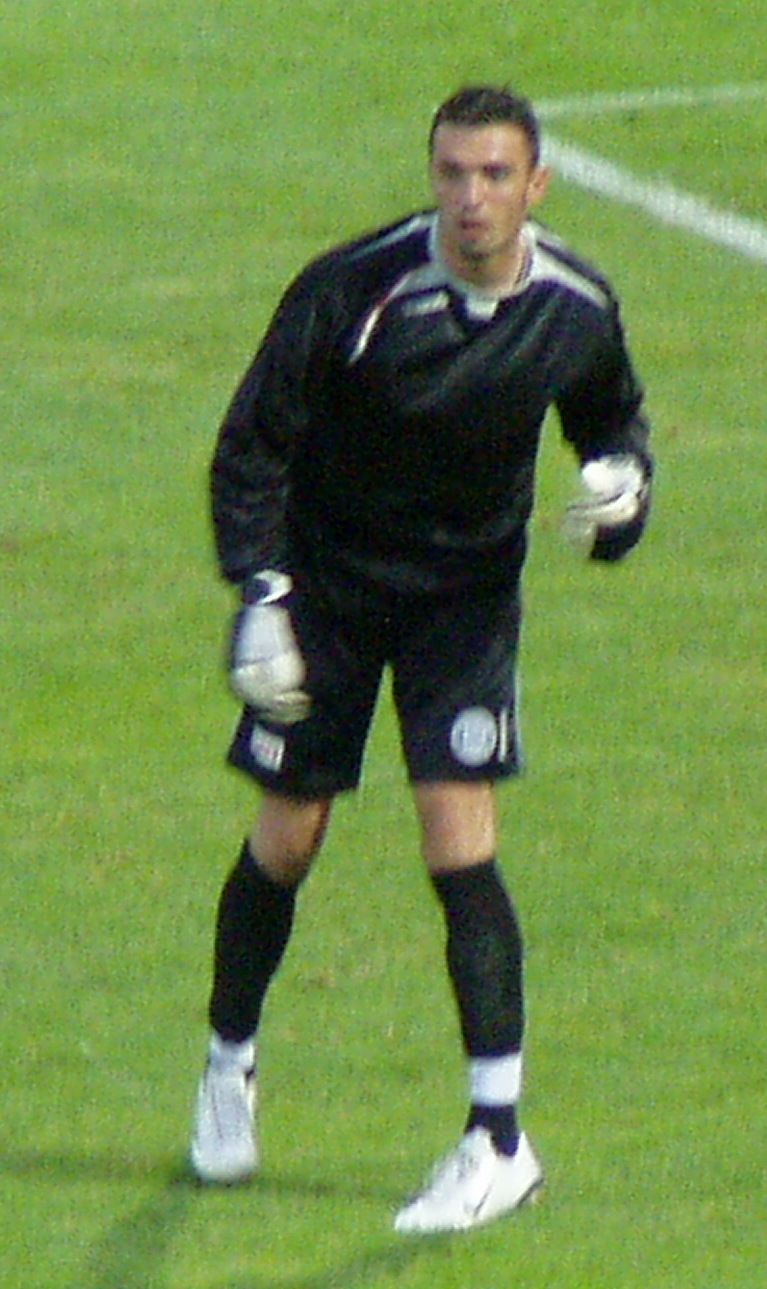 Đorđe Babalj szerb labdarúgó, ZTE-Aréna